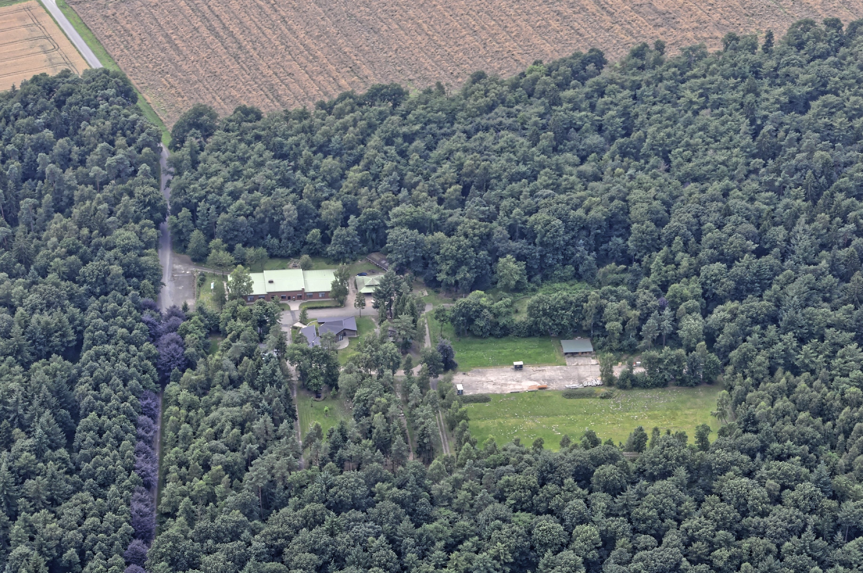 Bilder vom Flug Nordholz-Hammelburg 2015: Schwaförden, Jugendwaldheim Hahnhorst